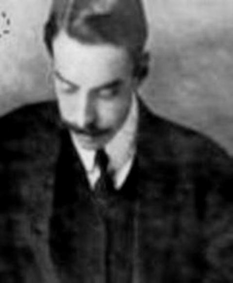 Fotografía de Arturo Borja Pérez, (n. Quito, 1892 - f. Ibídem, 12 de noviembre de 1912), poeta ecuatoriano, perteneciente al movimiento llamado "La Generación Decapitada" y el primero del grupo en despuntar como modernista ecuatoriano. Es muy escasa su obra artística pero suficiente para determinar la calidad de poeta: una corona de 20 composiciones forma el libro titulado "La flauta de ónix", y 6 poemas más; obras que fueron publicadas póstumamente. Se suicidó en 1912, contando apenas con 20 años de edad.